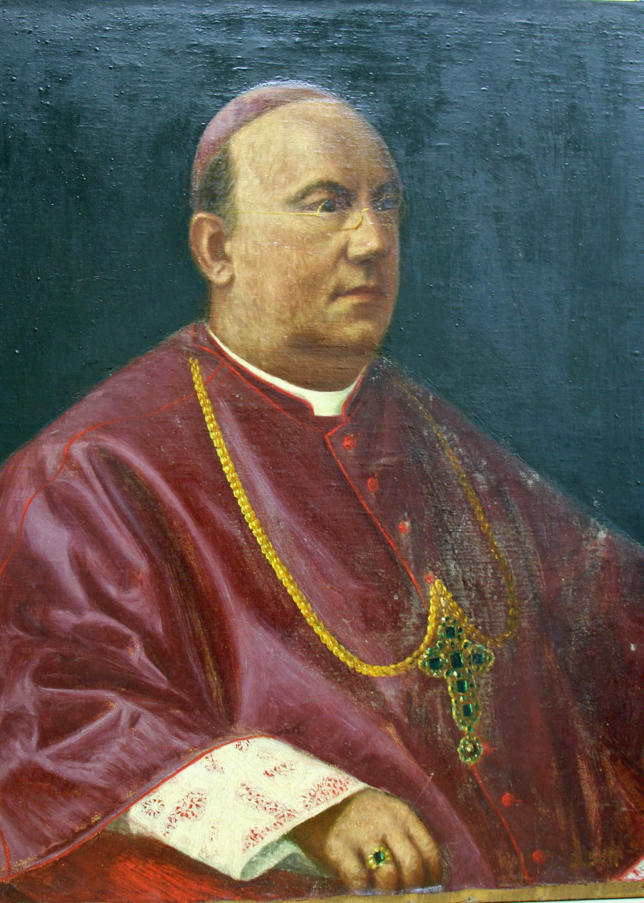 Ölgemälde des St. Galler Bischofs Robert Bürkler